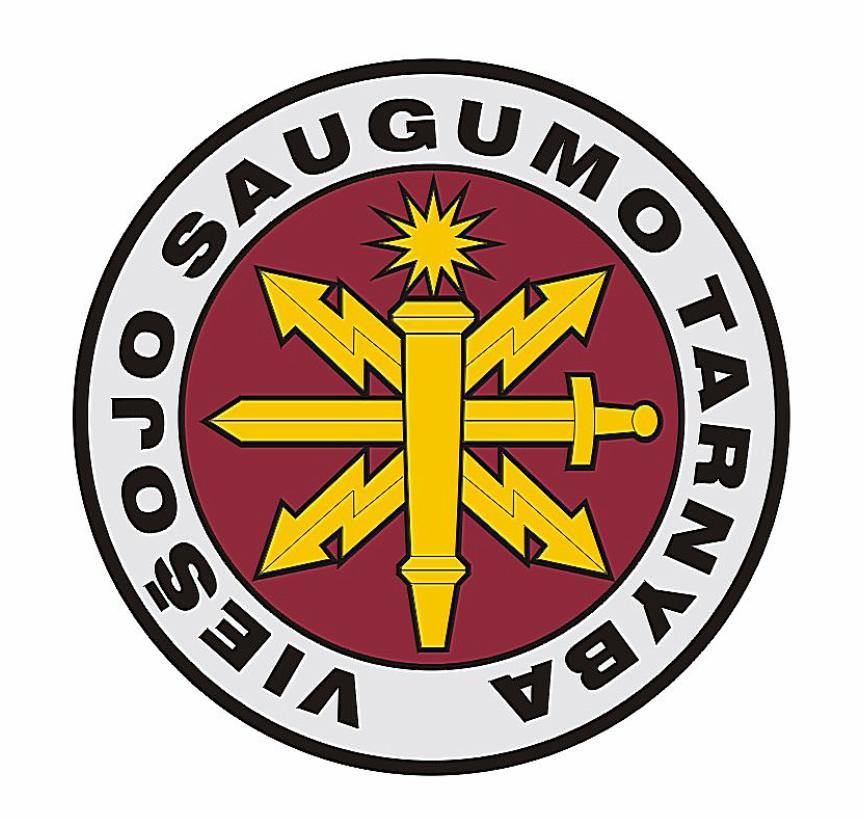 Insígnia do Serviço de Segurança Pública da Lituânia.